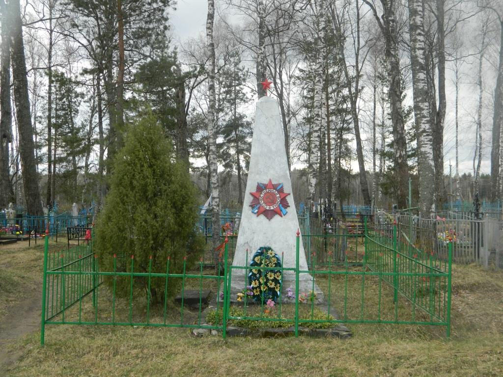 Братская могила 50 советских воинов, погибших в боях с немецко-фашистскими захватчиками: Бацкино, Дятьковский район, Брянская область